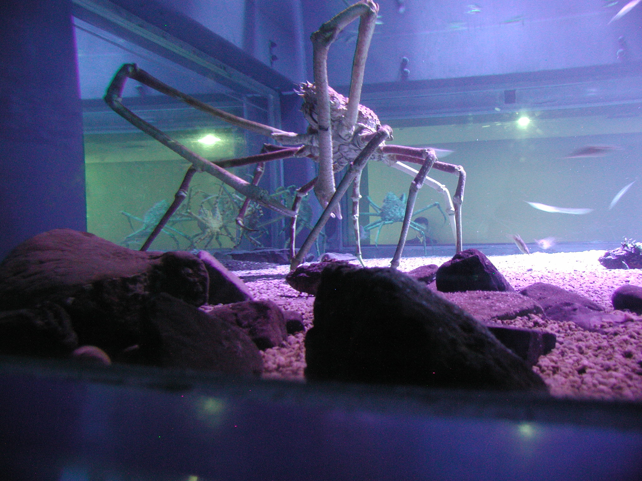 Spider crab at the Kaiyukan Aquarium in Osaka, Japan.